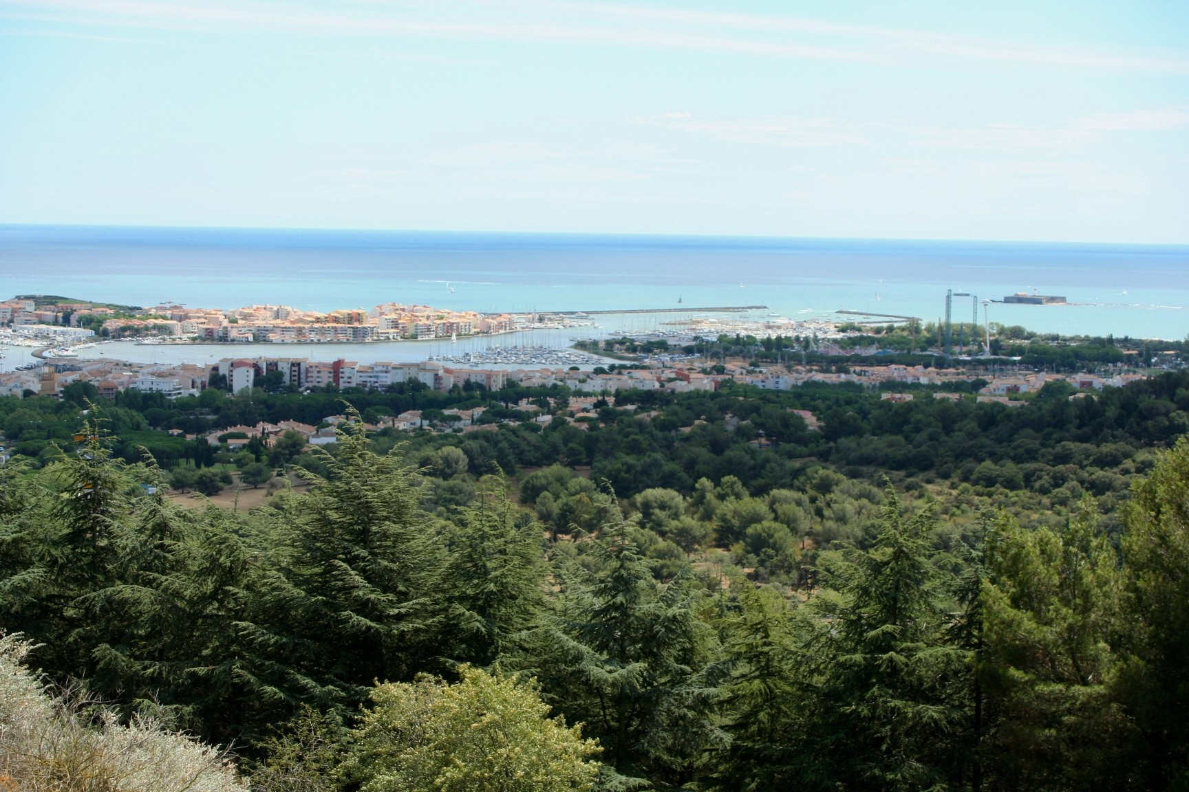 Le Cap-d'Agde, vue du mont Saint-Loup (Hérault, France) Juillet 2008